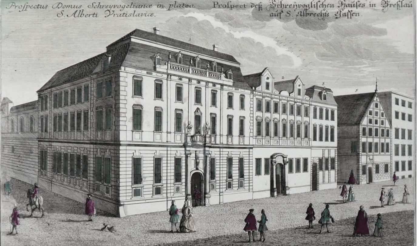 Pałac Schreyvoglów we Wrocławiu z XVIII wieku, grafika Karla Remsharta na podstawie rysunku F. B. Wernhera (Biblioteka Uniwersytecka)